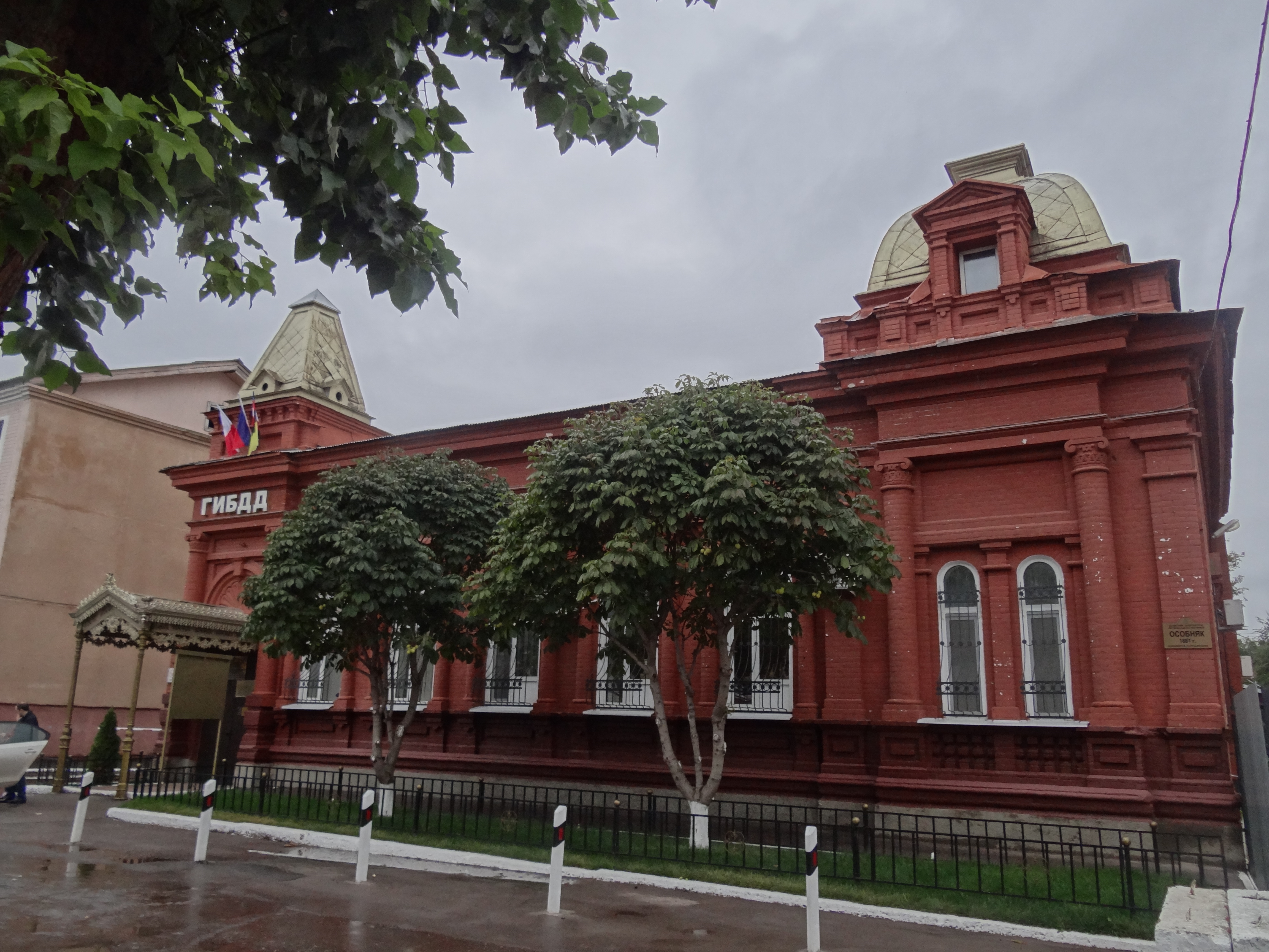 Особняк: улица Красноармейская, 12, Энгельс, Саратовская область. В советское время здесь находился краеведческий музей. Сейчас в этом здании размещается ГАИ.